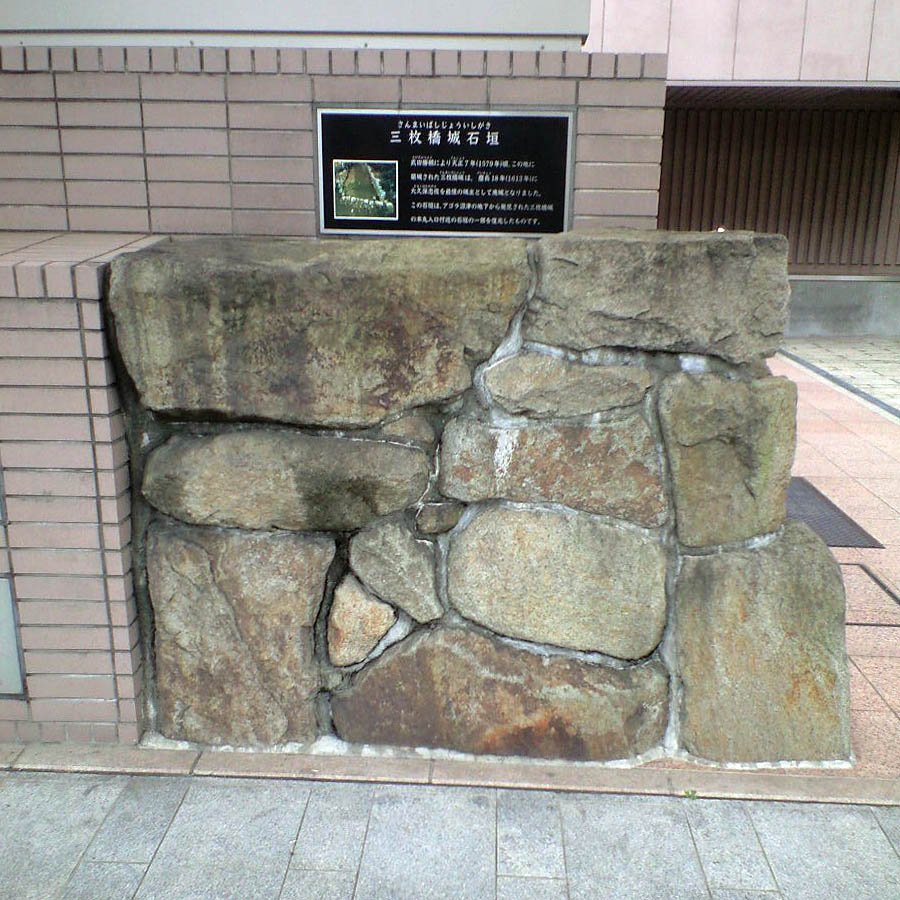 静岡県沼津市大手町（アゴラ沼津・静岡銀行前）、三枚橋城石垣（復元）